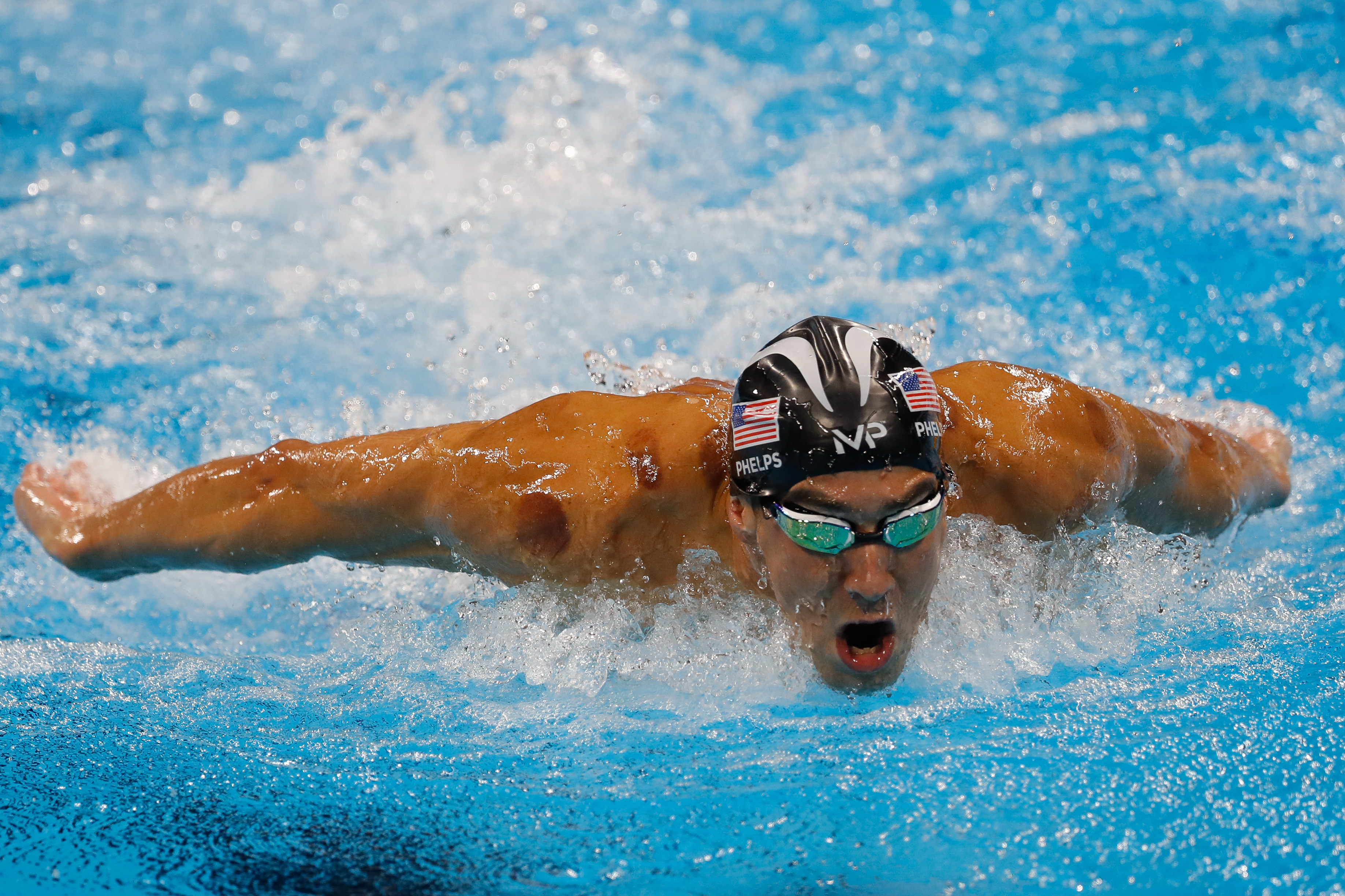 Rio de Janeiro - Michael Phelps, dos Estados Unidos, ganha sua 20ª medalha de ouro olímpica, nos 200m nado borboleta, nos Jogos Rio 2016. (Fernando Frazão/Agência Brasil)